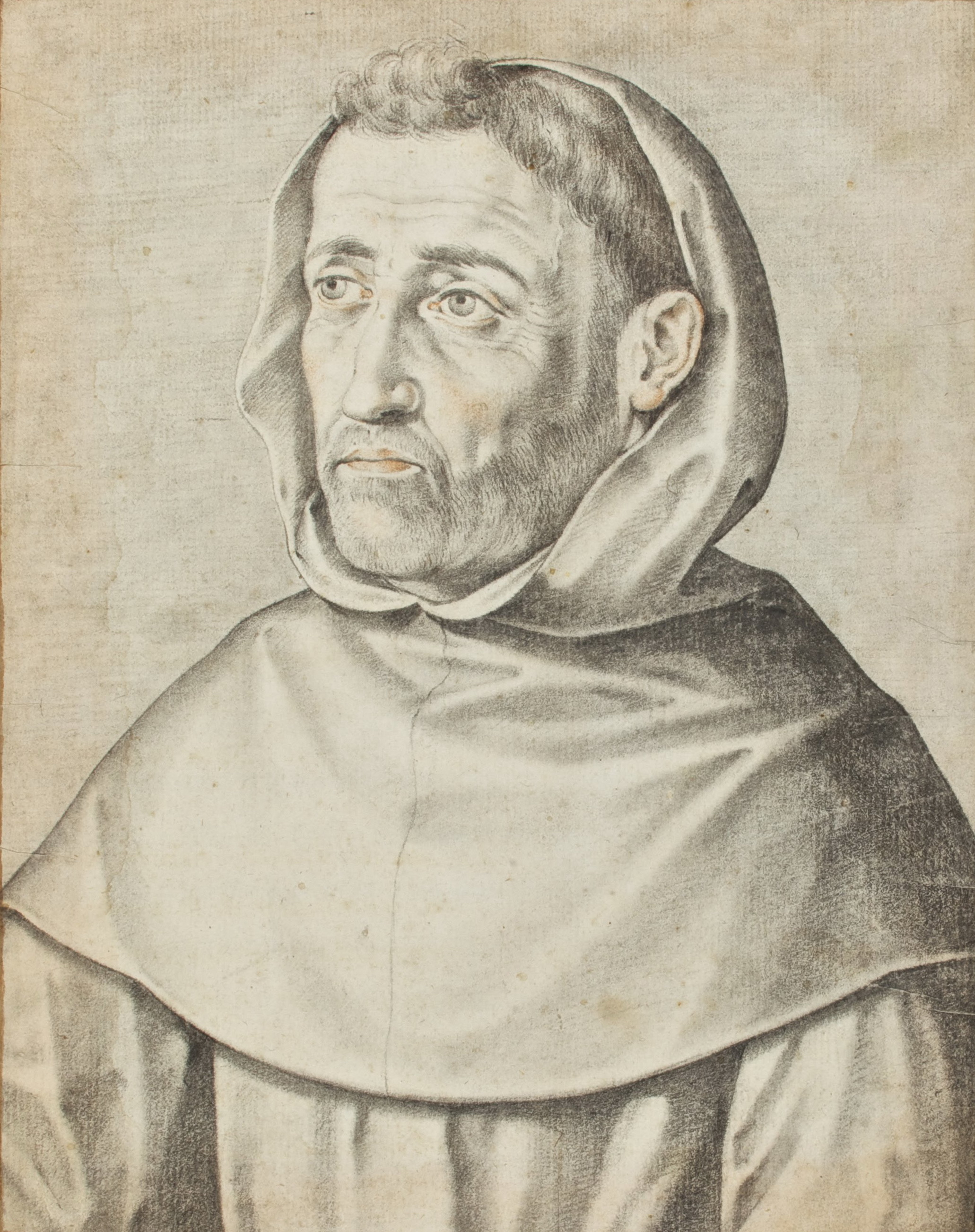 Detalle del retrato de Fray Luis de León en Francisco Pacheco, (1564-1644) El libro de descripción de verdaderos retratos, ilustres y memorables varones, [Sevilla, s.n., s.a.]- Real Academia de la Historia (Madrid). Signatura: 1/736